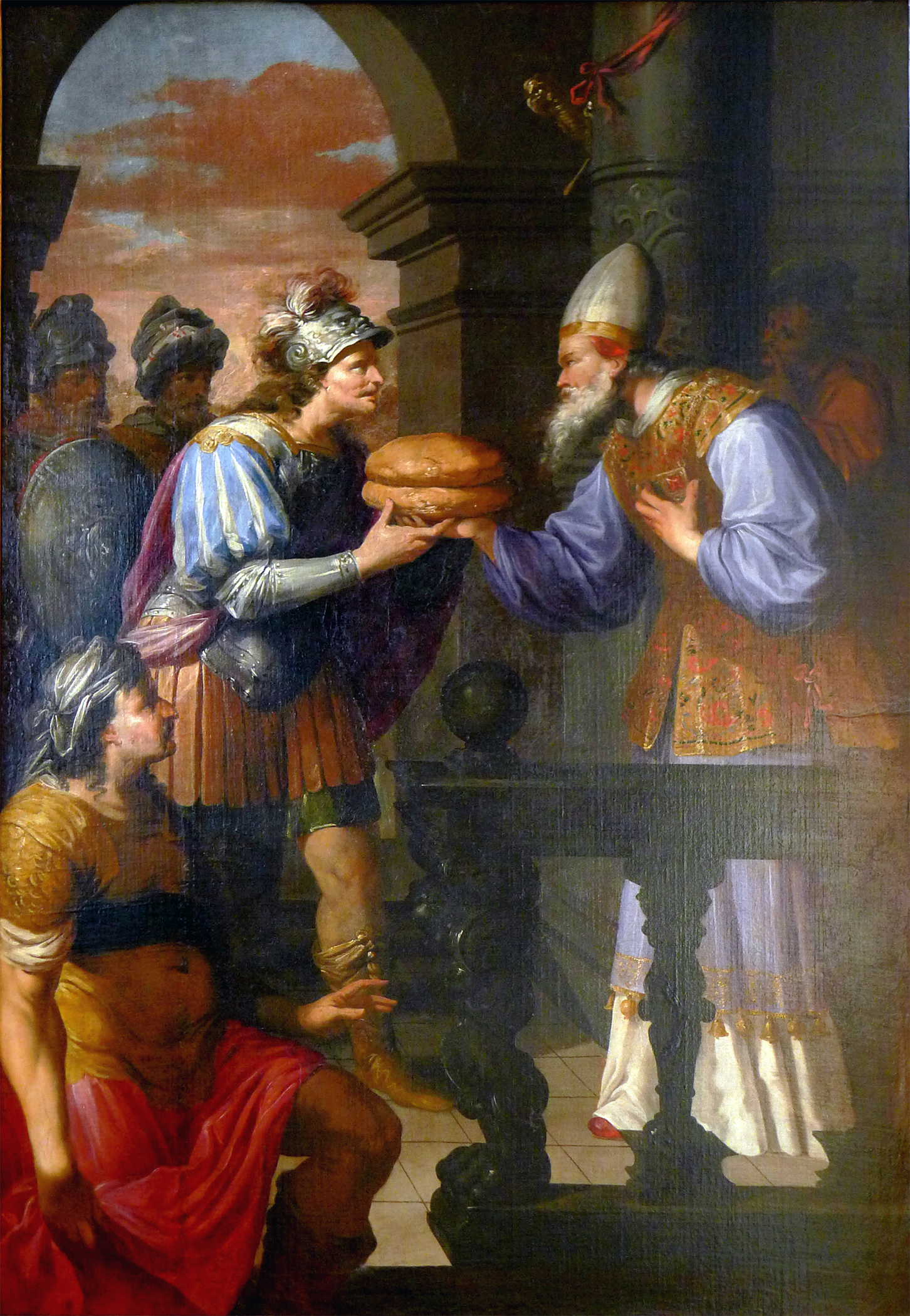 Église Notre-Dame-des-Blancs-Manteaux (tableau) - Paris IVe : David et le prêtre Achimélech.